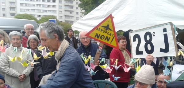 8 mai 2012. Les grévistes de la faim contre l'aéroport de Notre-Dame-des-Landes mangent à nouveau de la soupe après 28 jours. Grande émotion square Daviais à Nantes